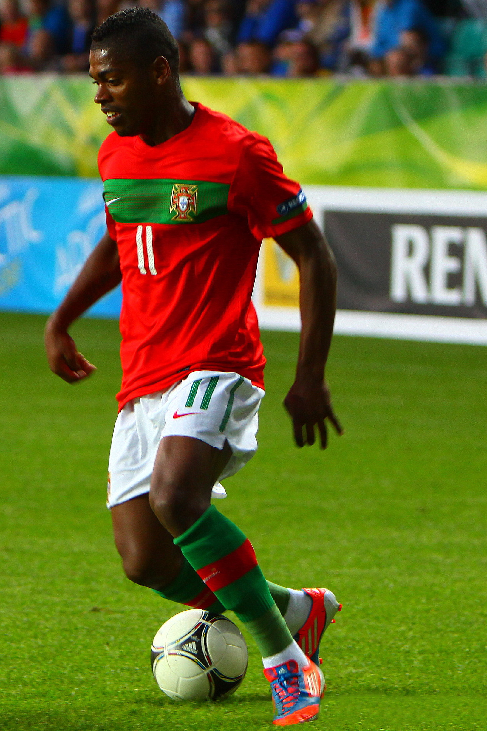 U-19 Estonia vs Portugal.